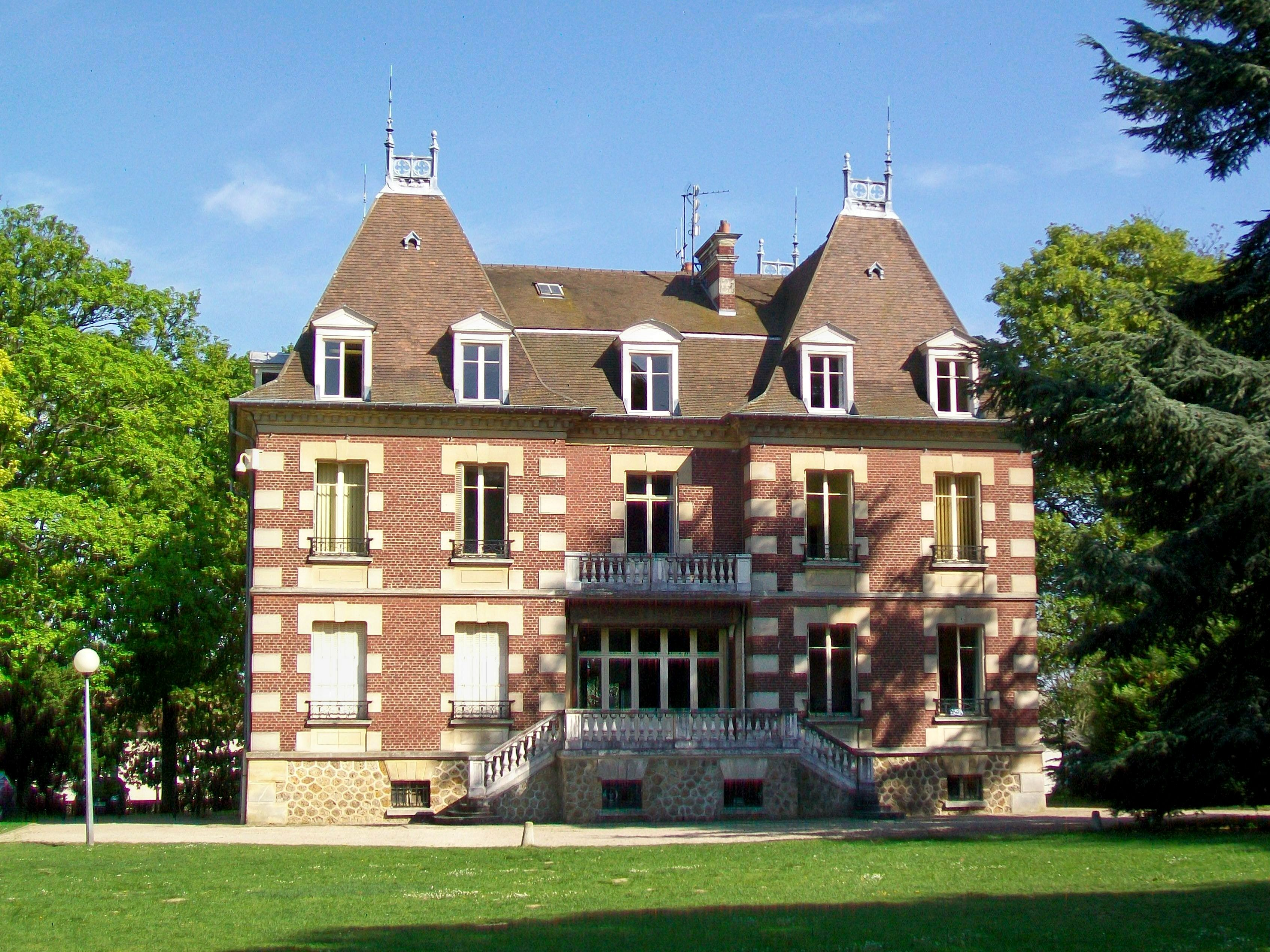 L'hôtel de ville de Survilliers (95), installé dans ce petit château de la famille Bouchard-Aubergé du début du XXe siècle depuis 1970. La ville a acquis la totalité du parc en 1976 pour l'ouvrir au public.